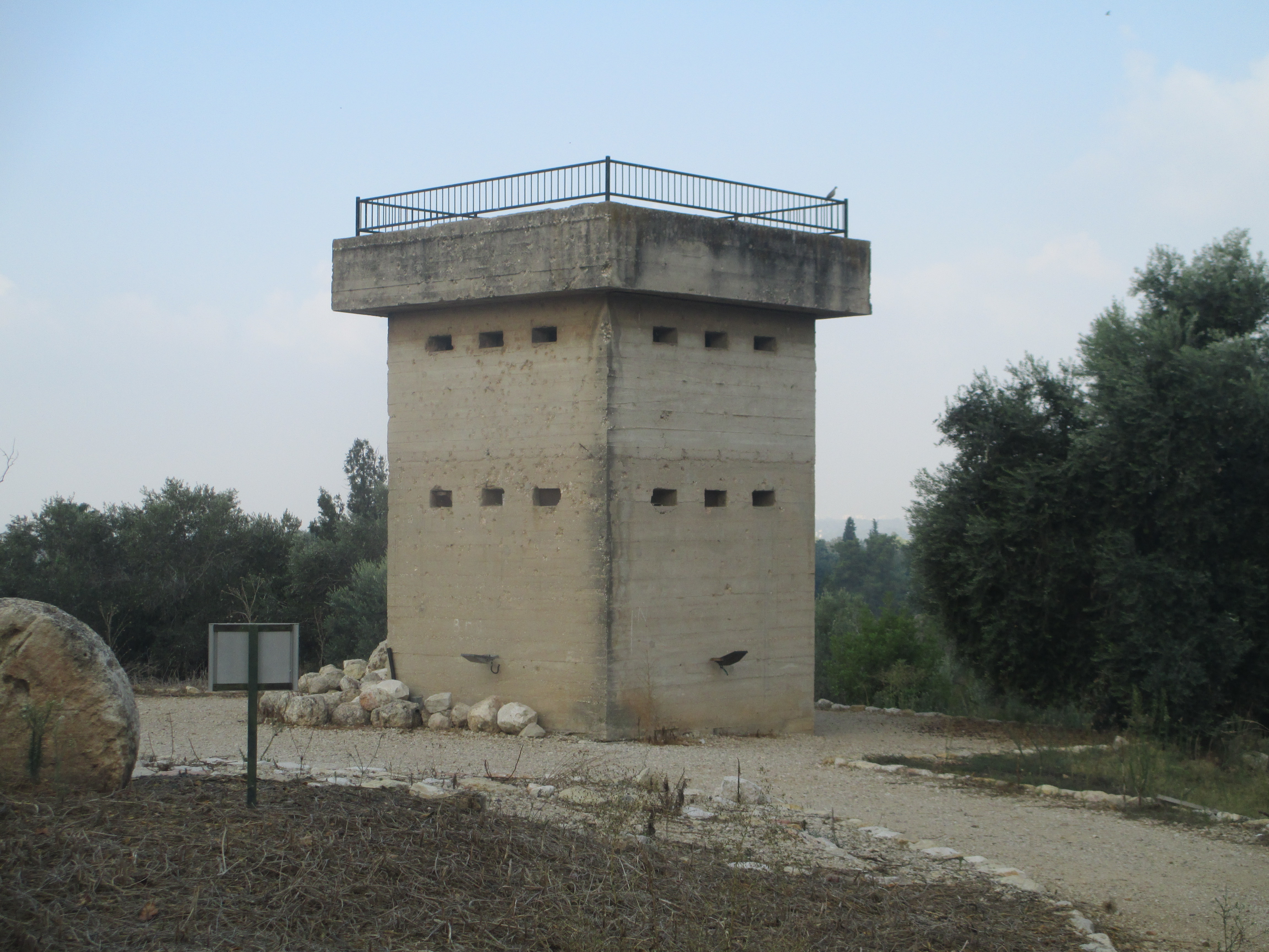 עמדת הפילבוקס בפארק מגיני מענית